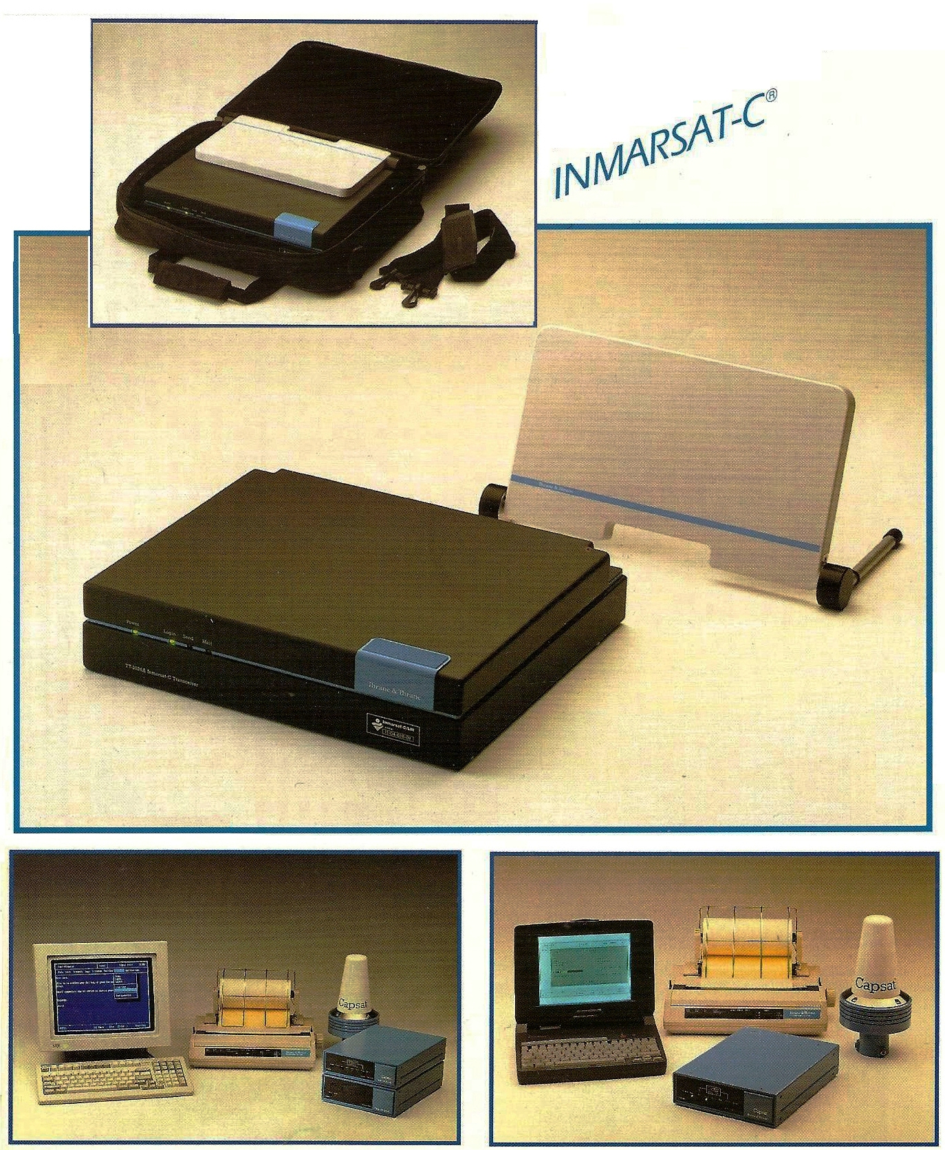 Valise INMARSAT C (en texte uniquement) est pour gérer la position de la station valise INMARSAT C (et du bateau) le déroulement d'une campagne de pêche, d'une course au large) le déroulement d'un plan d'urgence les informations d'assitance technique les informations météorologiques les messageries électroniques les télex les Fax, Document, Fax Internet Safetynet et Fleetnet SMS texte SMDSM information de sécurité 1626,5 à 1646,5 MHz, valise Inmarsat C vers satellite Inmarsat 1530 à 1545 MHz satellite Inmarsat vers valise Inmarsat C